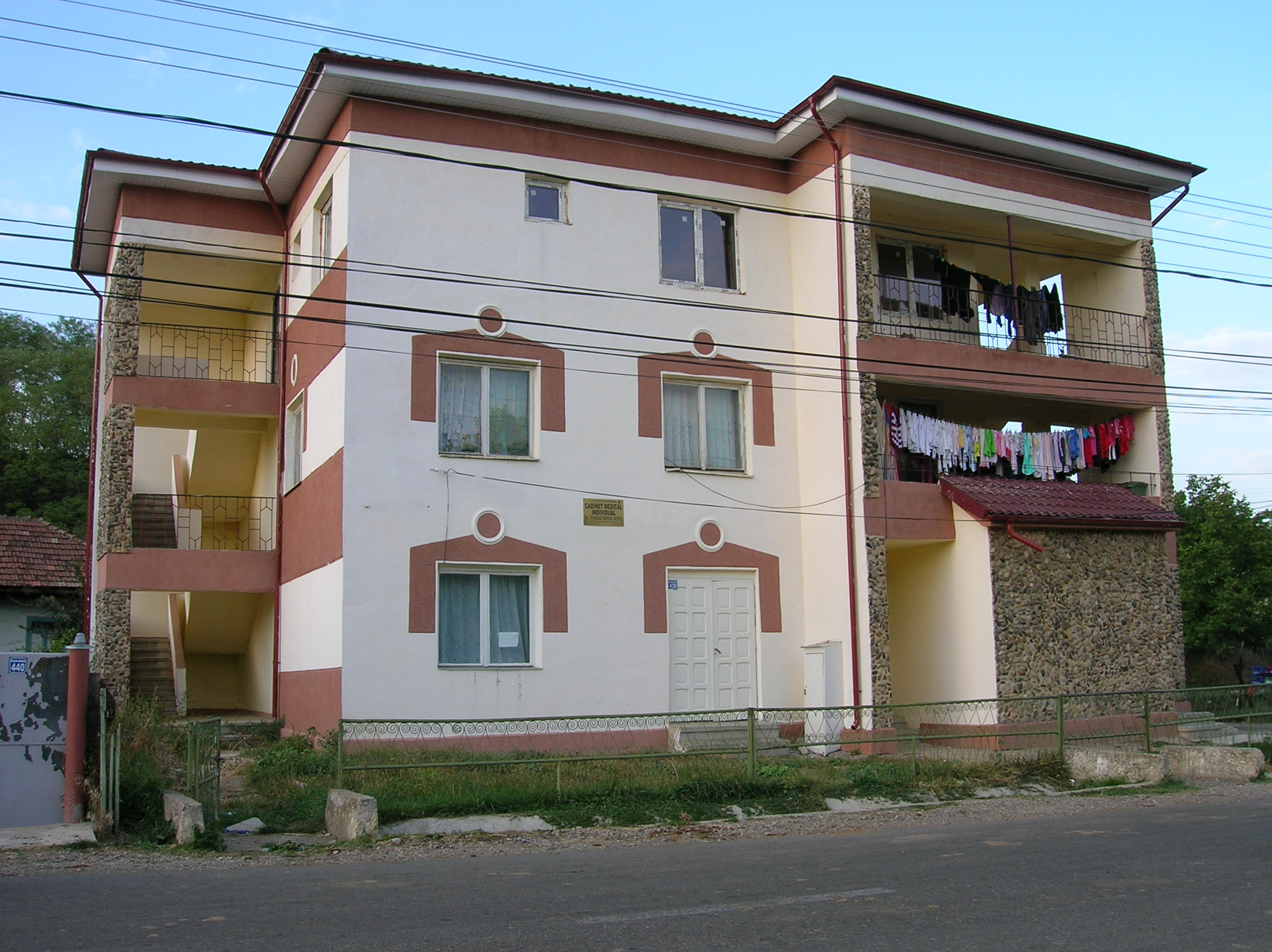 Comuna Valea Seacă Bacău - Satul Valea Seacă - Dispensarul Comunal